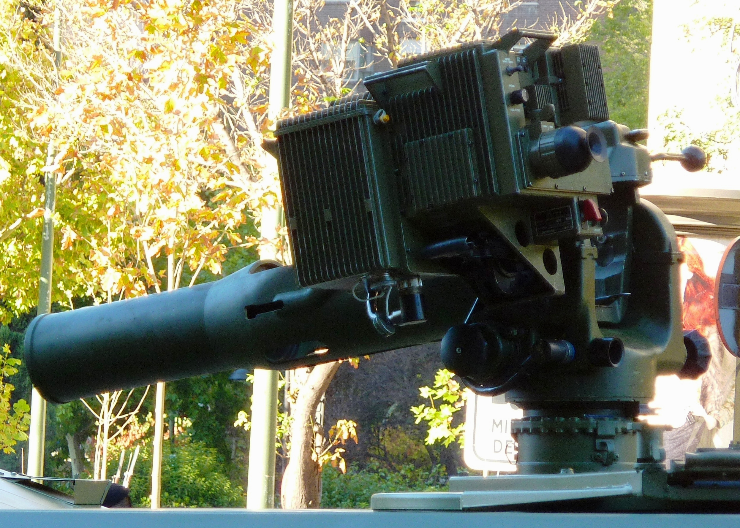 TOW sobre un VAMTAC del Ejército Español.